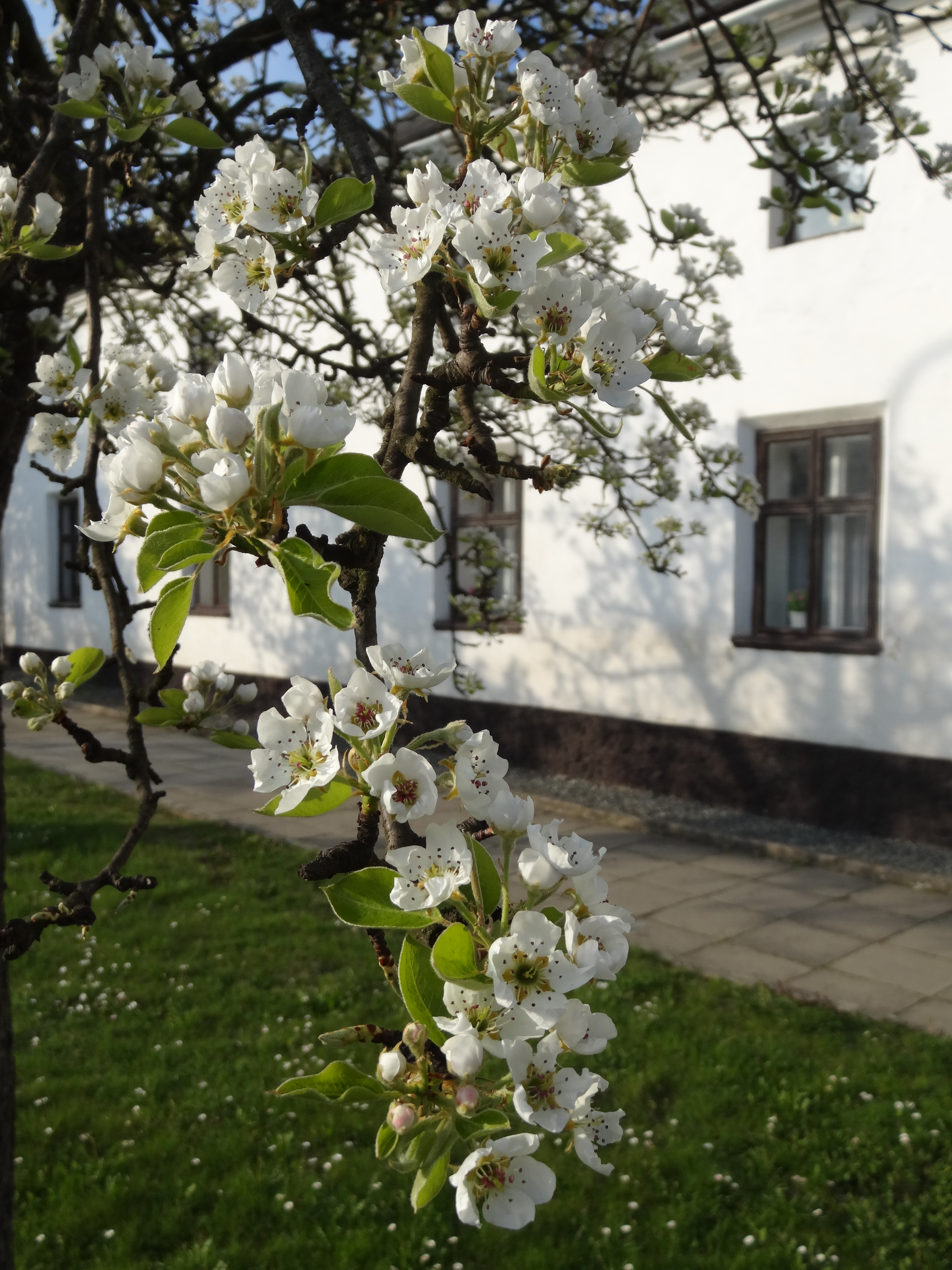 Moravičanská náves